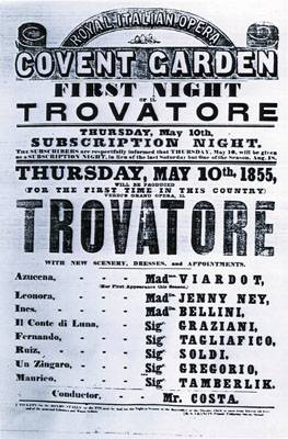 Афиша